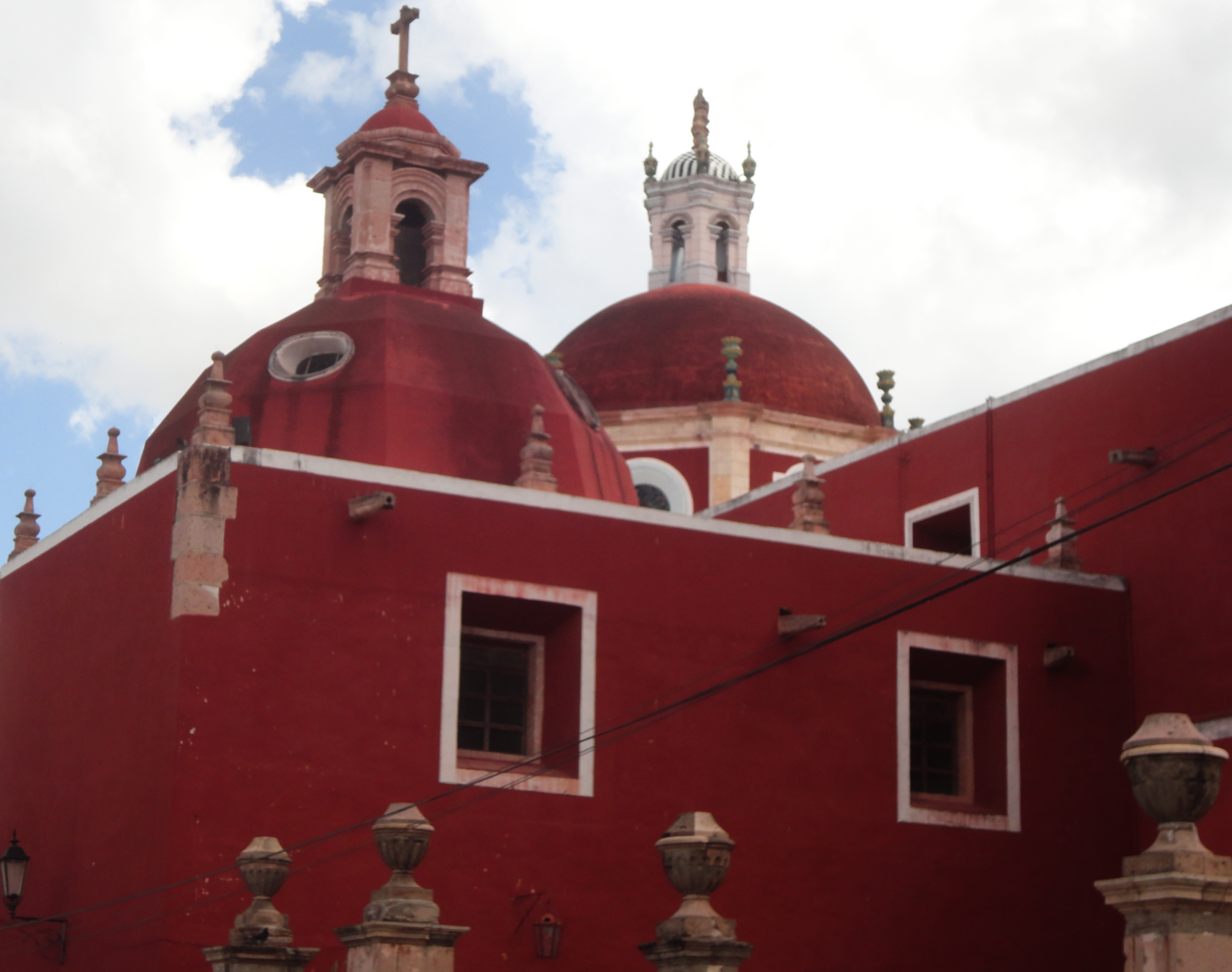 Parroquia de San Felipe Apóstol - San Felipe (San Felipe Torresmochas), Guanajuato, México.